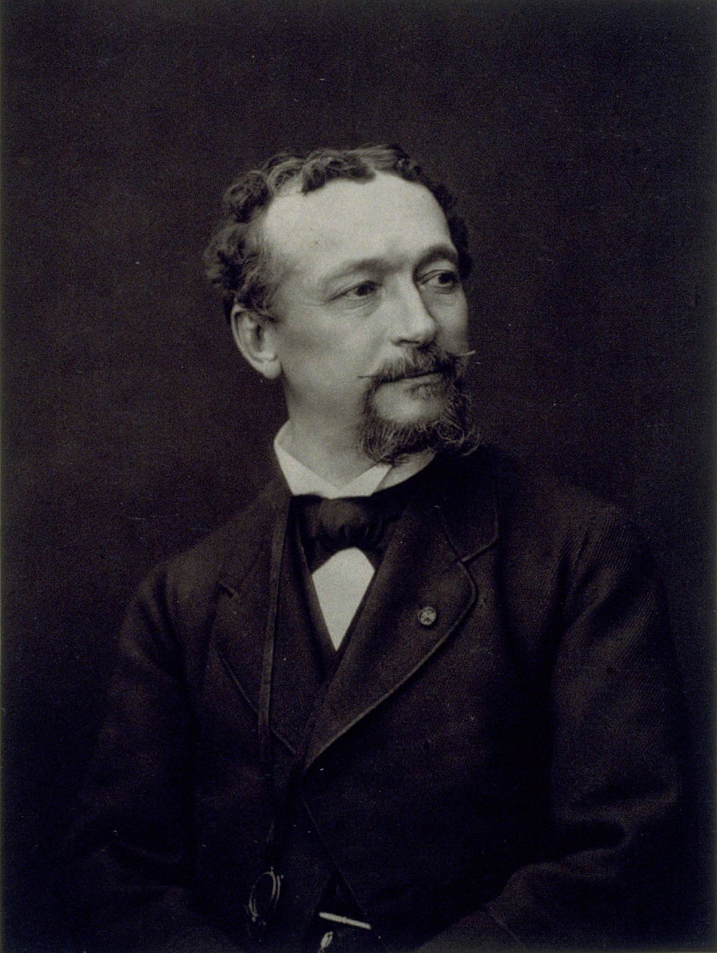 Portrait of Édouard-Louis Dubufe